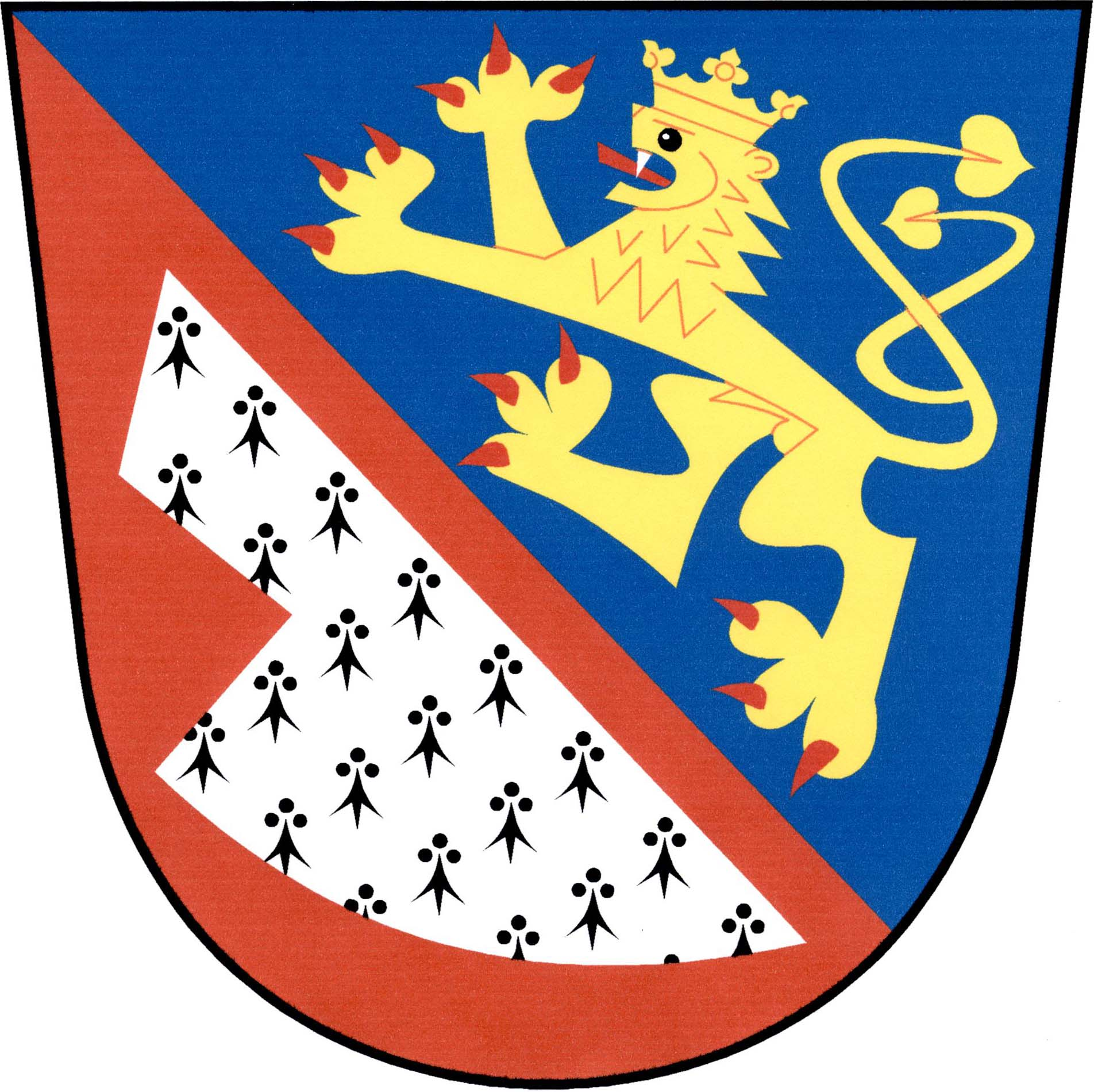 Znak obce Plužná